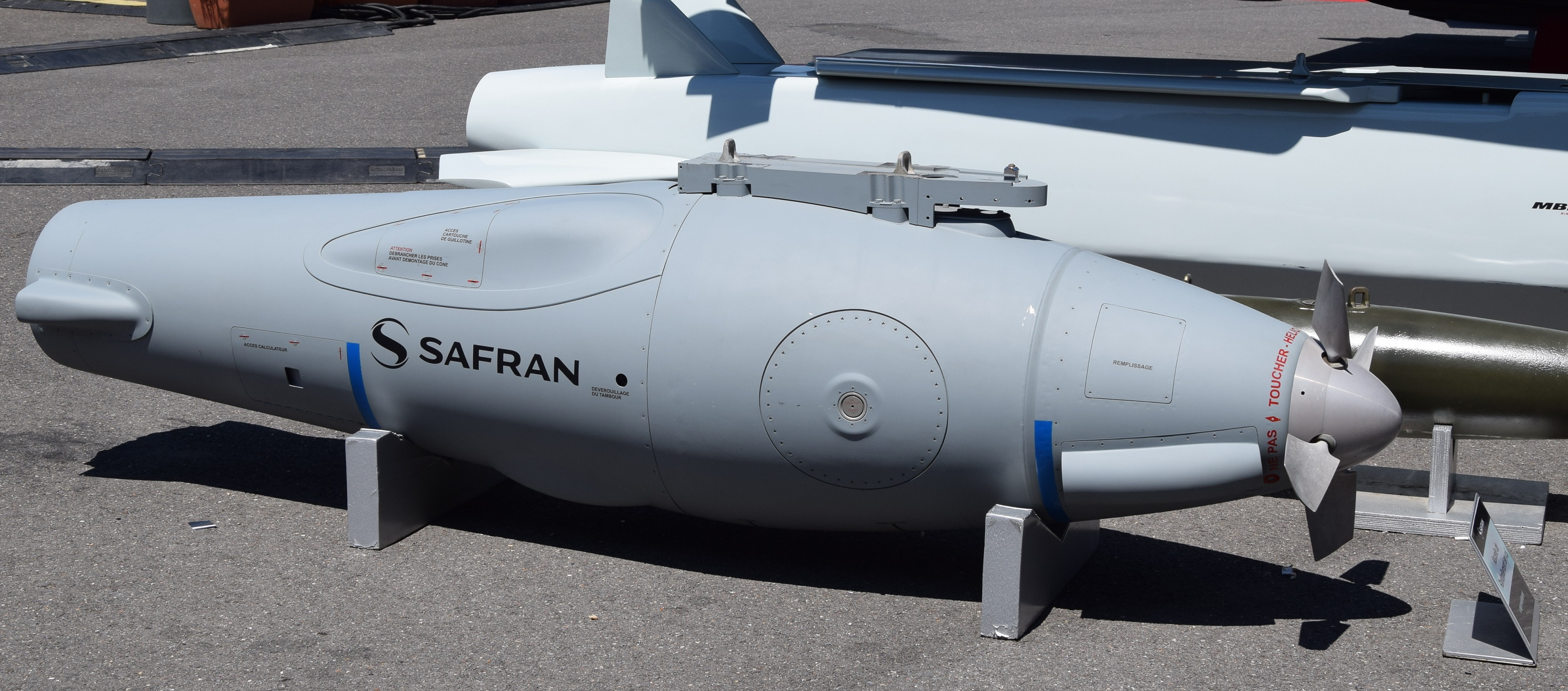 Nacelle de ravitaillement de nouvelle génération, au stand de Dassault Aviation, au salon du Bourget 2019